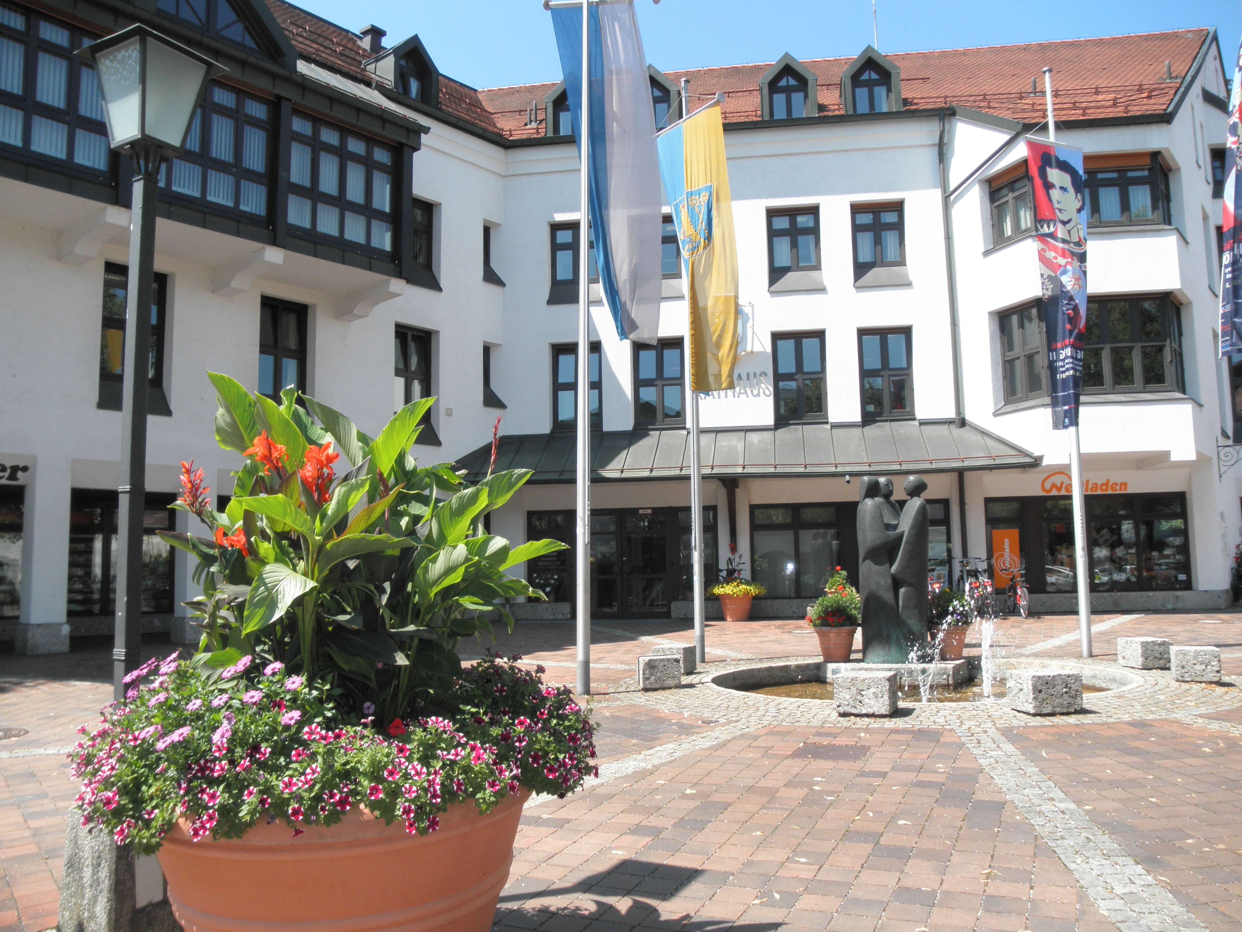 urbodomo de Prien am Chiemsee (Bavario)